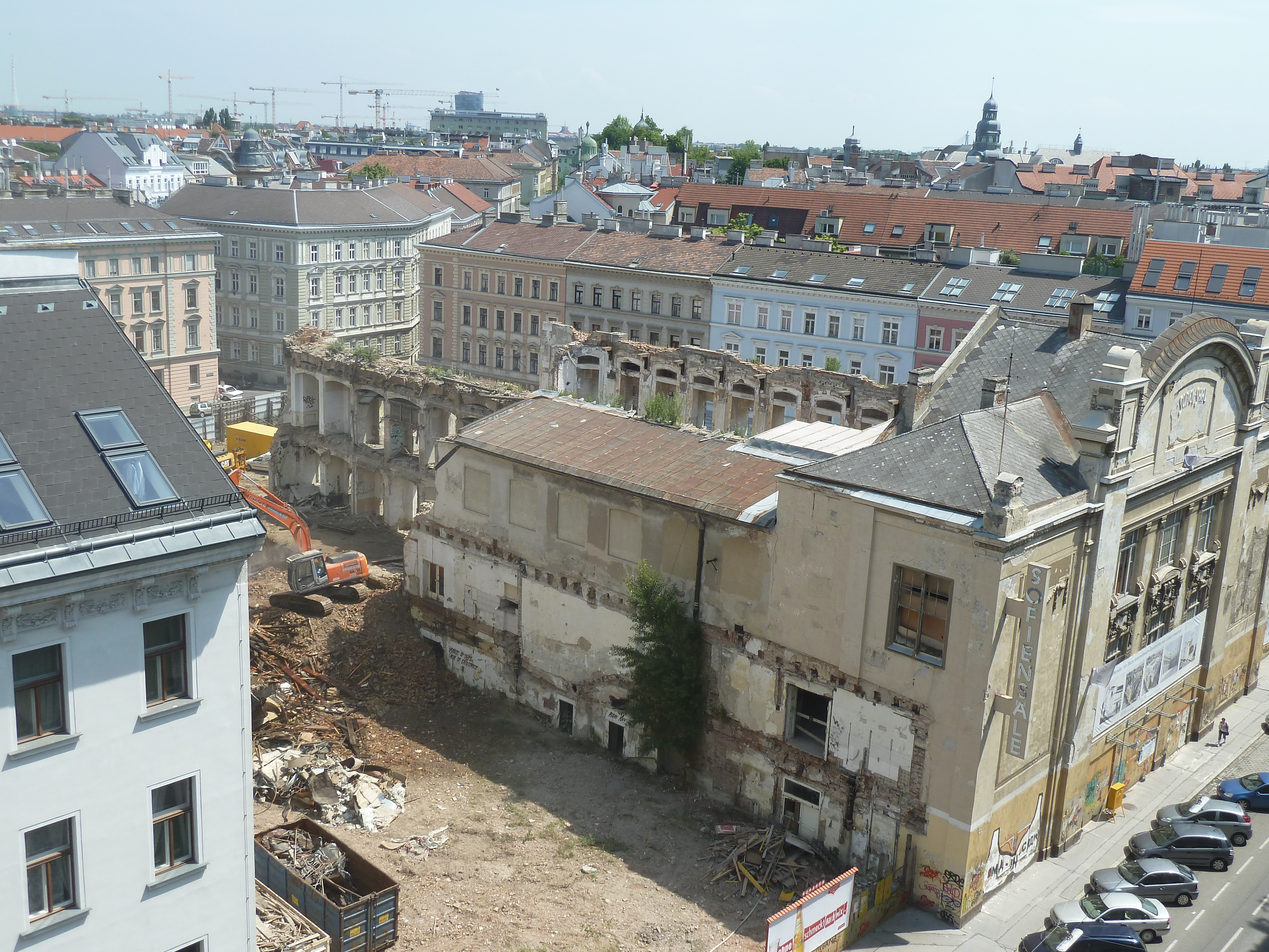 Sofiensaal Landstrasse